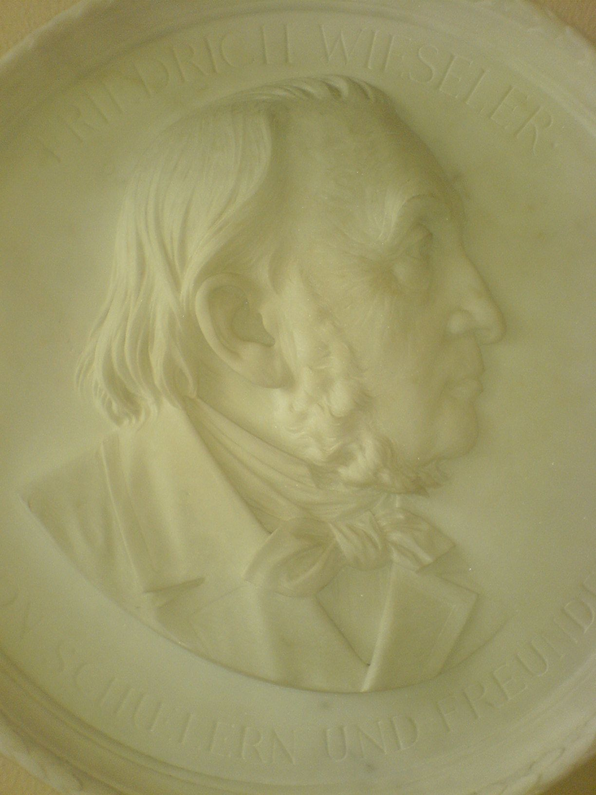 Friedrich Wieseler (1811–1892), deutscher Archäologe, Professor in Göttingen. Marmorrelief (Tondo), gestiftet von seinen Schülern zum 50-jährigen Professorenjubiläum, begonnen und nach dem Tode Wieselers vollendet von Friedrich Küsthardt. Im Besitz des Göttinger Instituts für Archäologie.